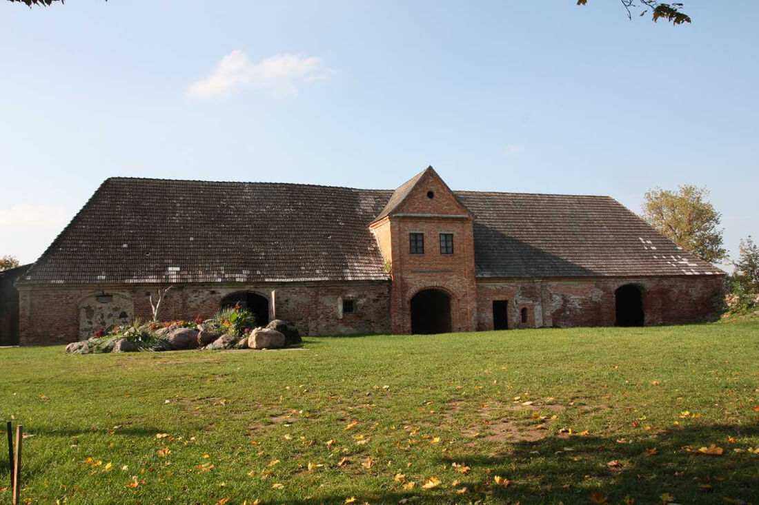 Vienuolyno arklidė su vežimine